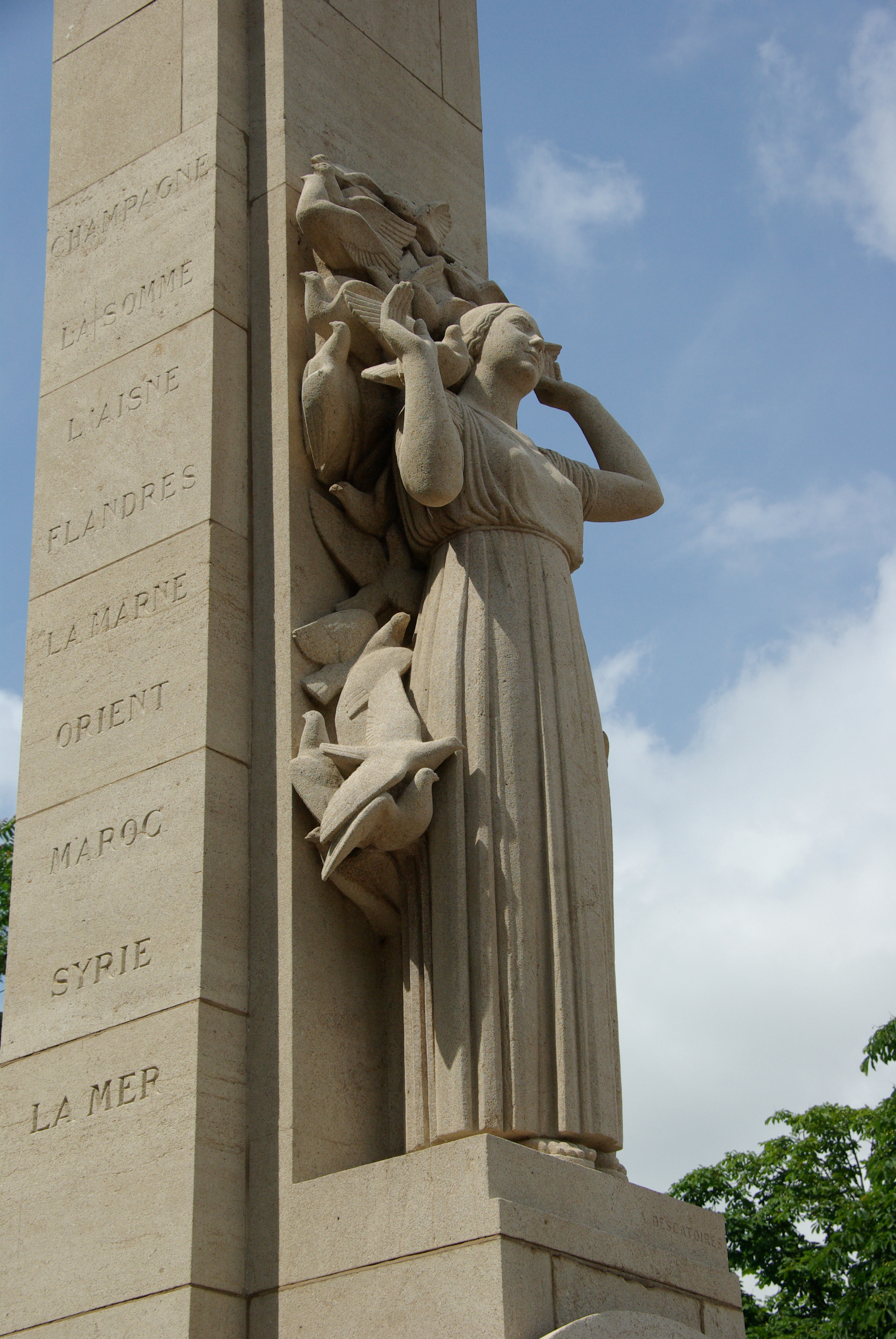 Monument qui rend hommage aux pigeons voyageurs, Lille